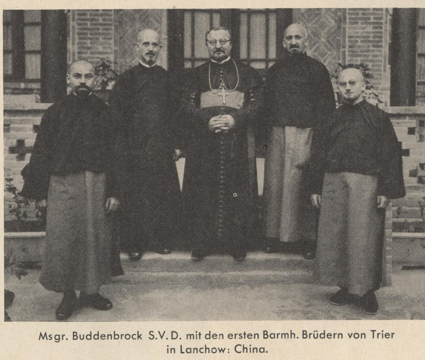 Bischof Theodor Buddenbrock SVD mit Chinamissionaren